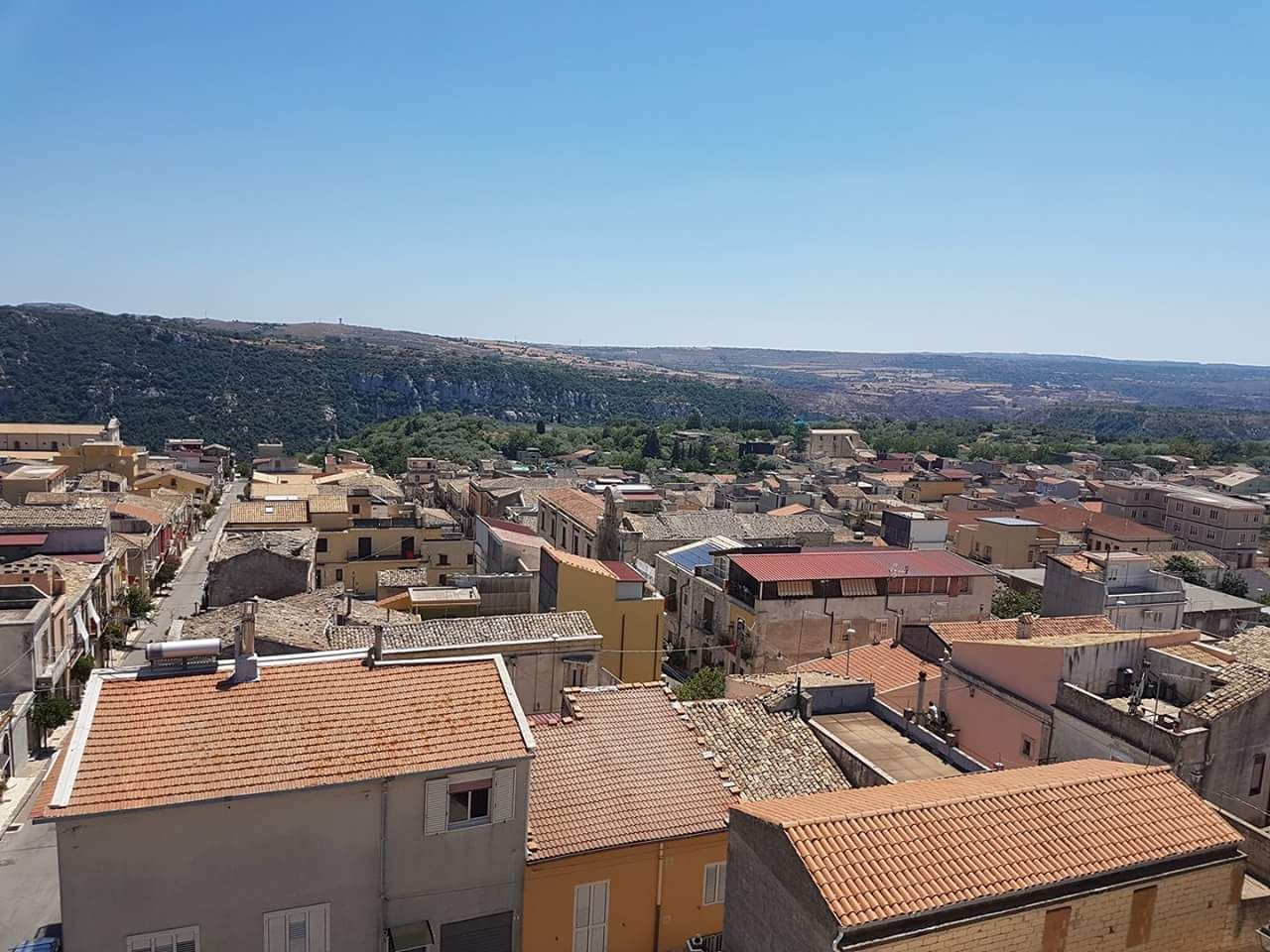 Panorama aereo